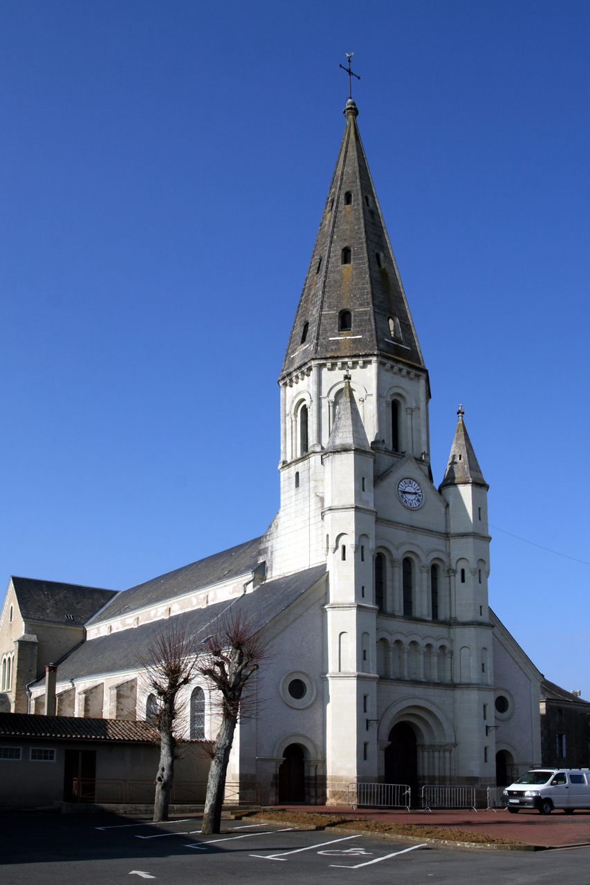 Eglise de Saint Varent